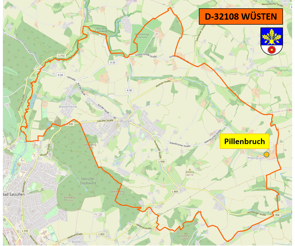 Deutschland (D) - Nordrhein-Westfalen (NW) - Kreis Lippe (LIP) - Bad Salzuflen - Wüsten: Ortsteil 'Pillenbruch', Lage im Ortsgebiet